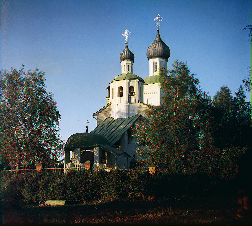 Бородинская церковь. Фотография С.М. Прокудина-Горского. 1911 г.